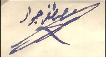 توقيع الدكتور مصطفى جواد ( قل ولاتقل ) اخذت هذه الصورة من الوثائقي ( مصطفى جواد ) الذي يظهر التوقيع في الدققية 5:23 ، اخراج مهدي زاهد ، انتاج شبكة الاعلام العراقي - قناة العراقية 2010 ، لمن يود مشاهدة الوثائقي ( اضغط هنا )